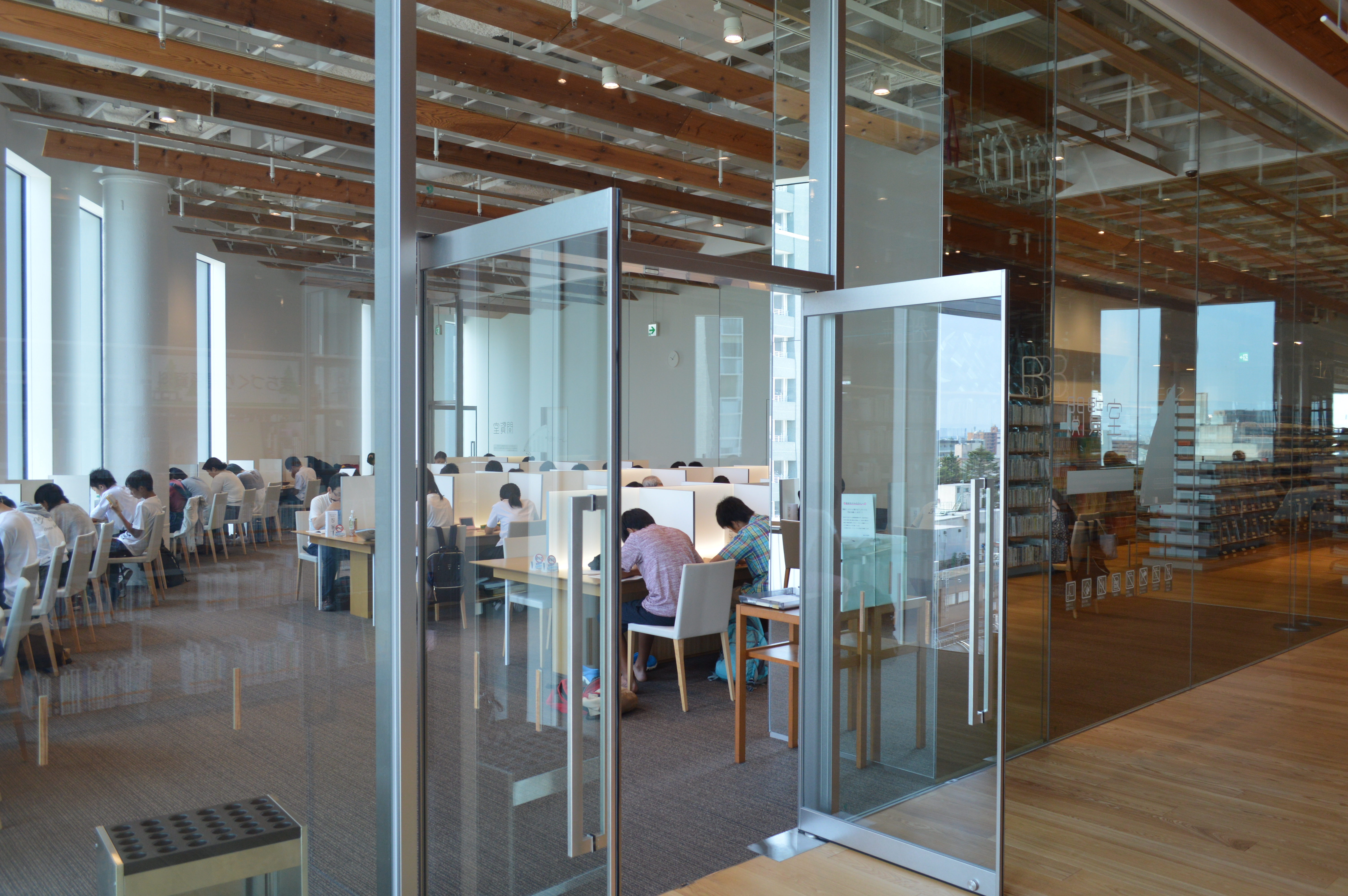 TOYAMAキラリ。ガラスで区切られた閲覧室。